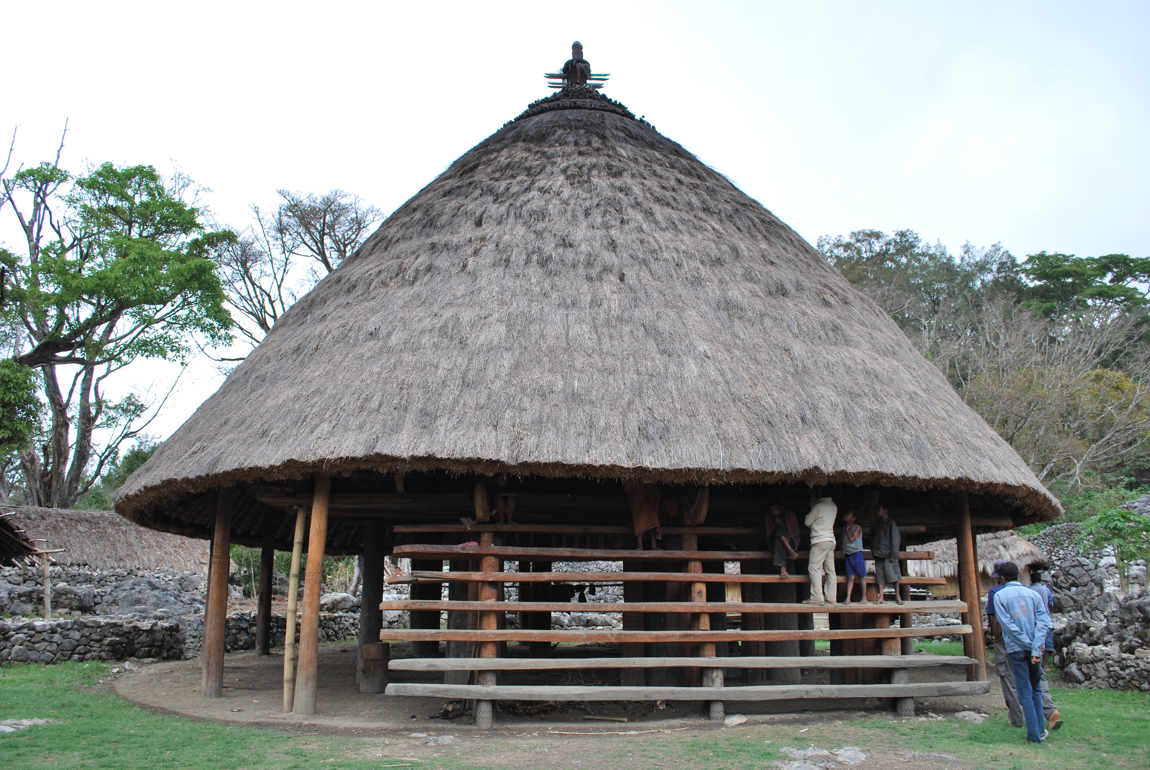 Uma Lulik in Fad Locar, Hautio, Suco Nuno-Mogue, Subdistrikt Hatu-Builico, Distrikt Ainaro